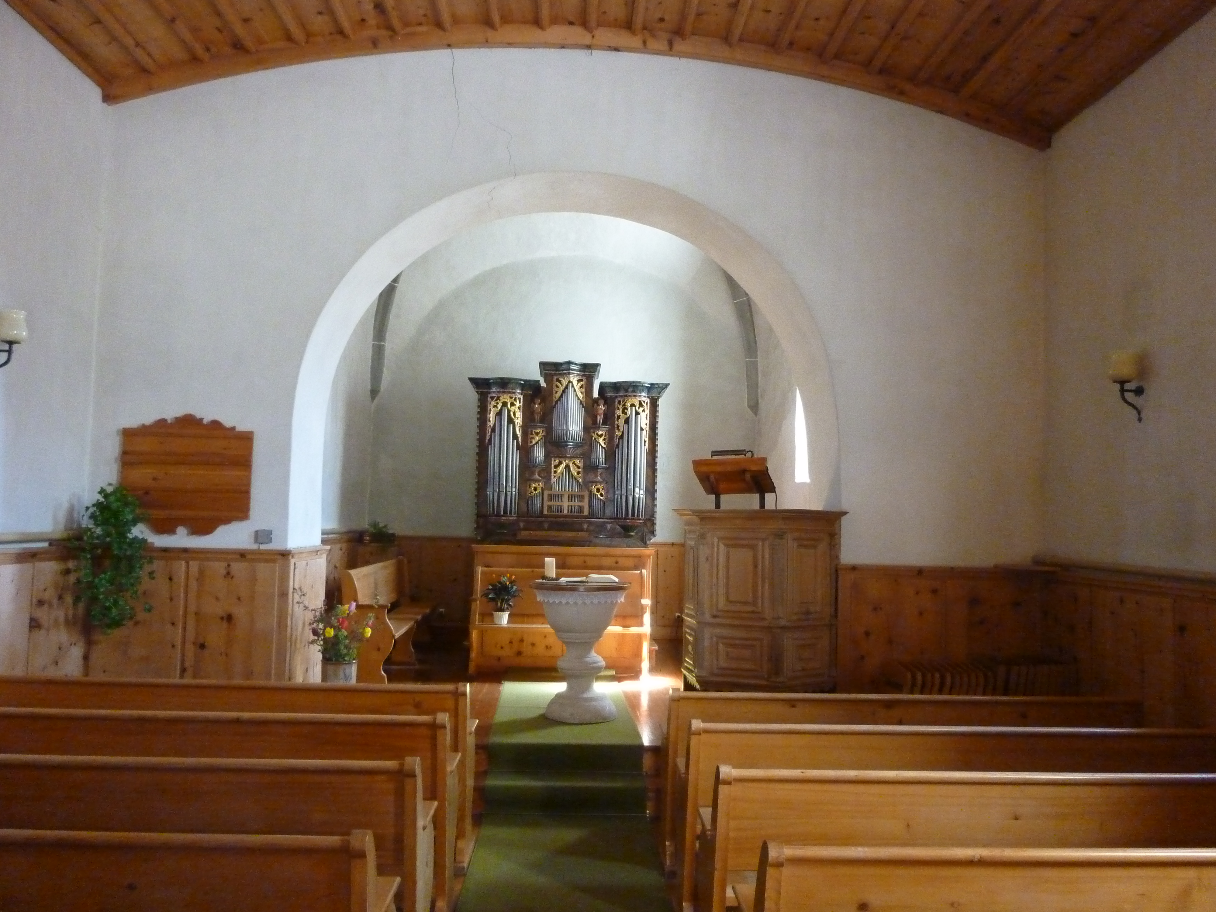 Tschierten, Inneres der Reformierten Kirche